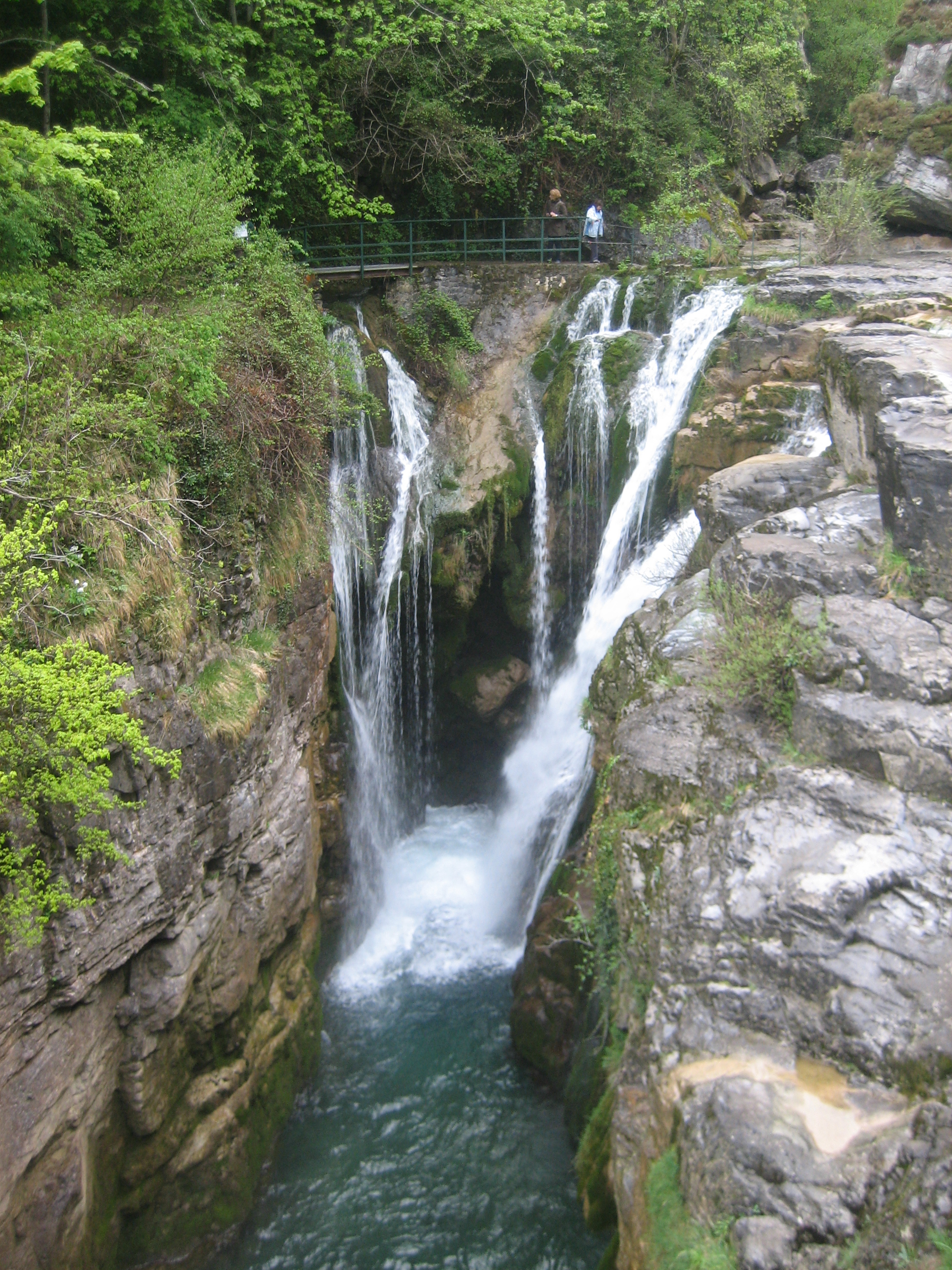 Cañón del Añisclo This is a photography of a Site of Community Importance in Spain with the ID: ES0000016. Natura2000 entry, EEA entry